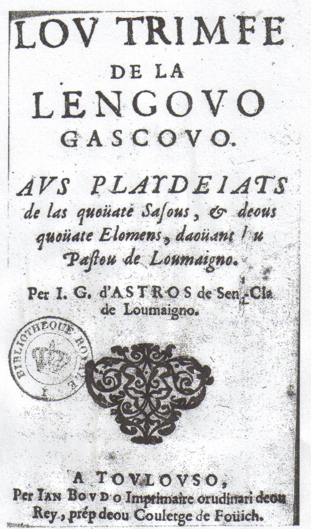 premiera pagina d'ua edicion d'Astros